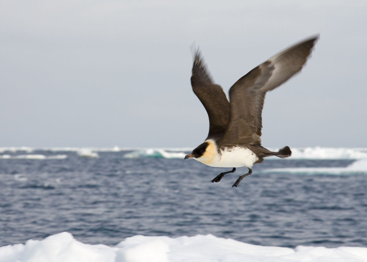 Pomarine Jaeger (Stercorarius pomarinus), adult summer